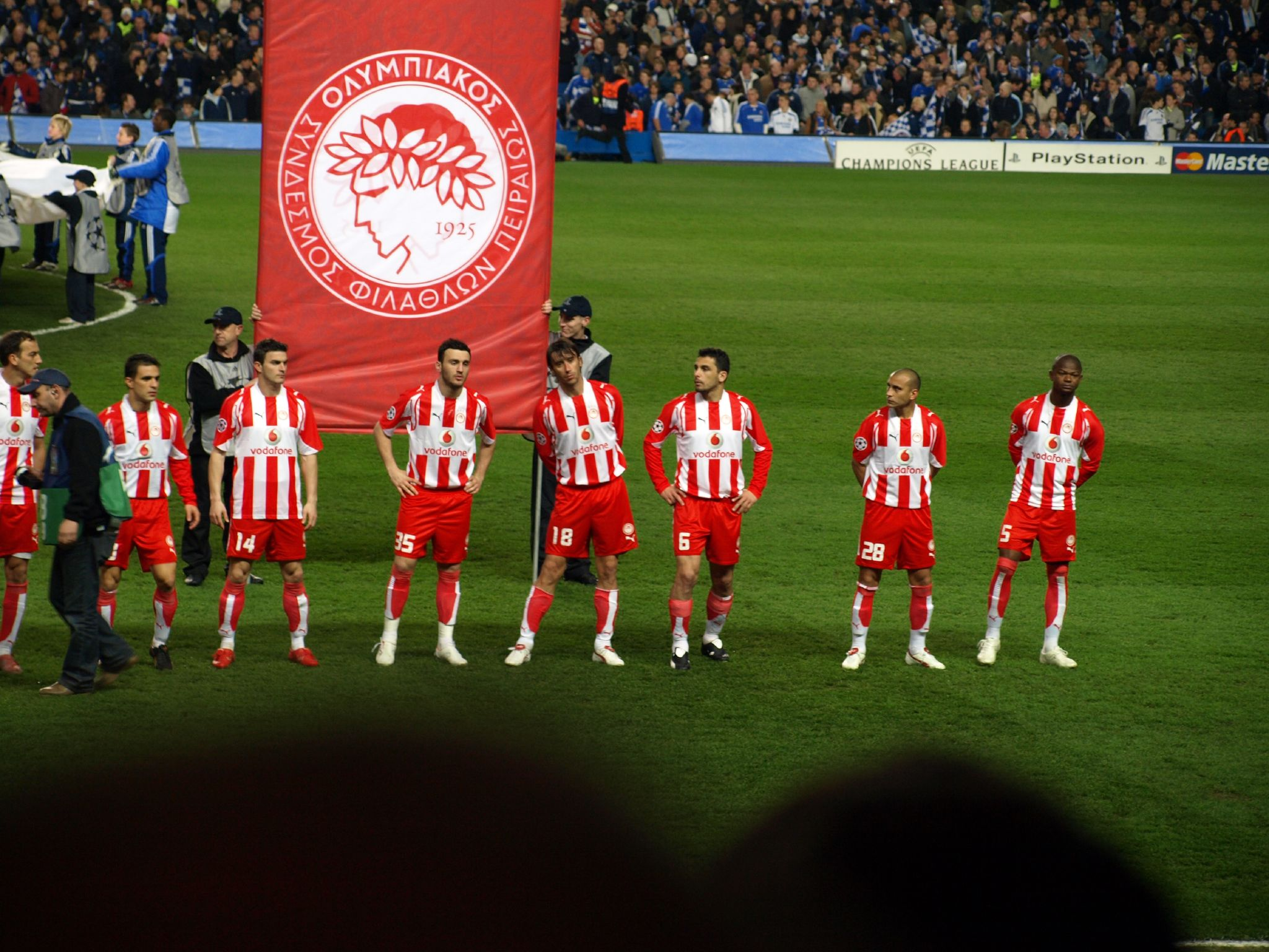 Chelsea (3) v (0) Olympiakos